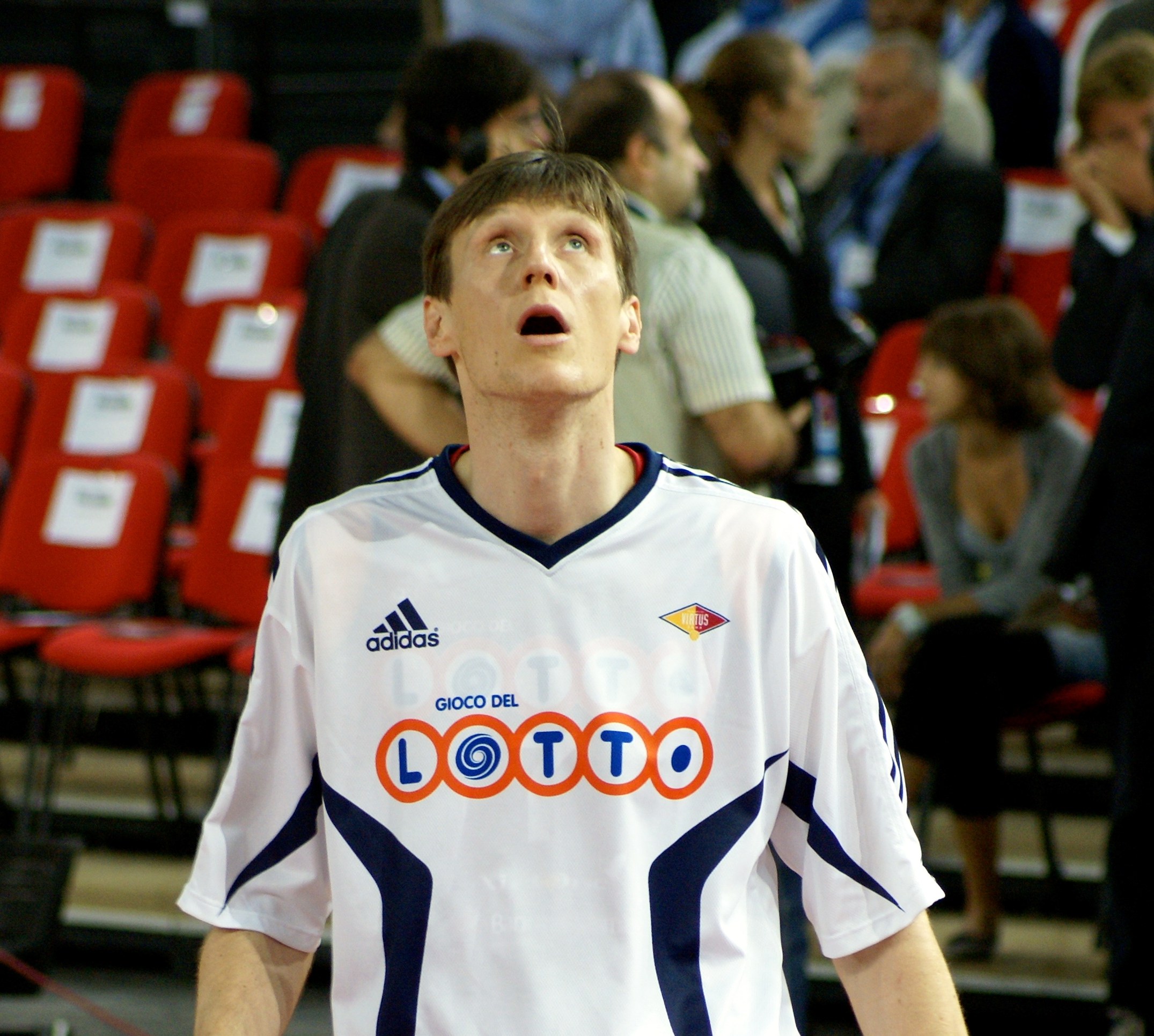 Gregor Fucka